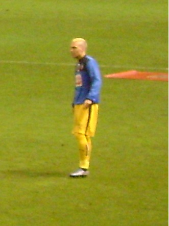 Verdi, jugador del Eibar.